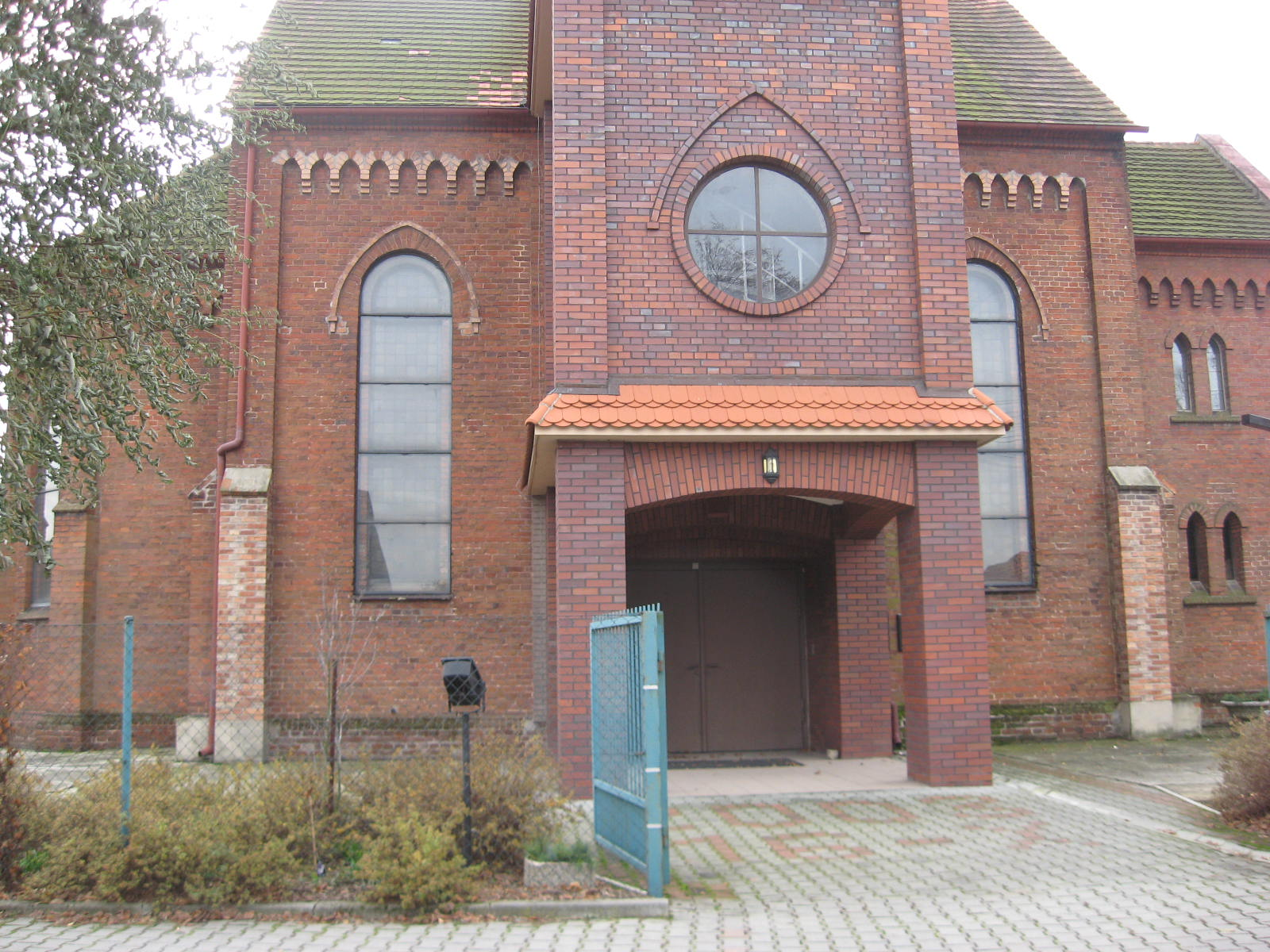 Wejście główne 01